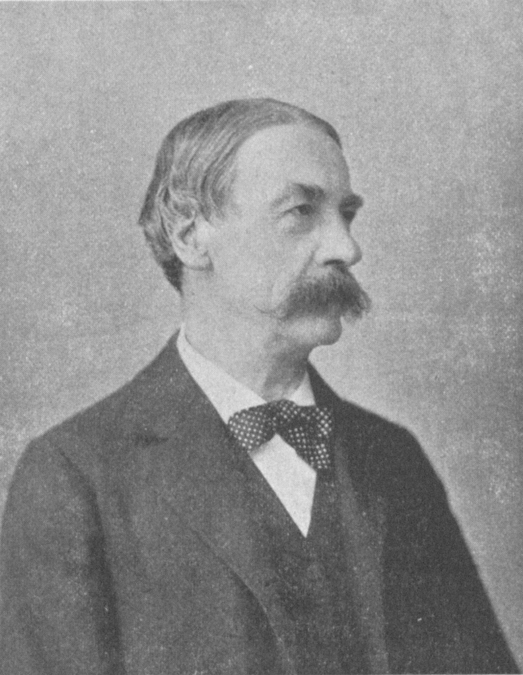 Karl Sigmund Hohenwart Graf von Gerlachstein (1824-1899), Austrian politician